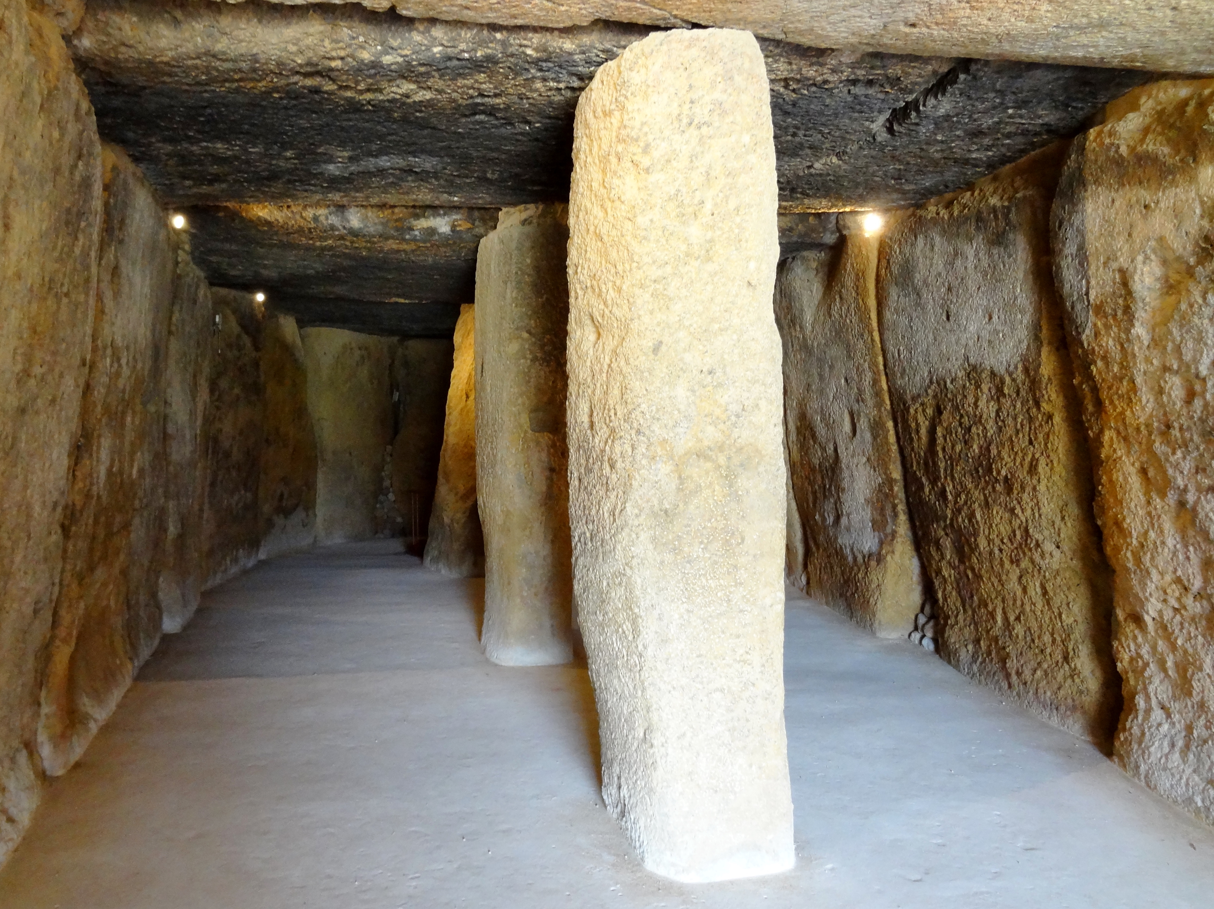 Dolmen de Menga in Antequera, Provinz Málaga, Spanien